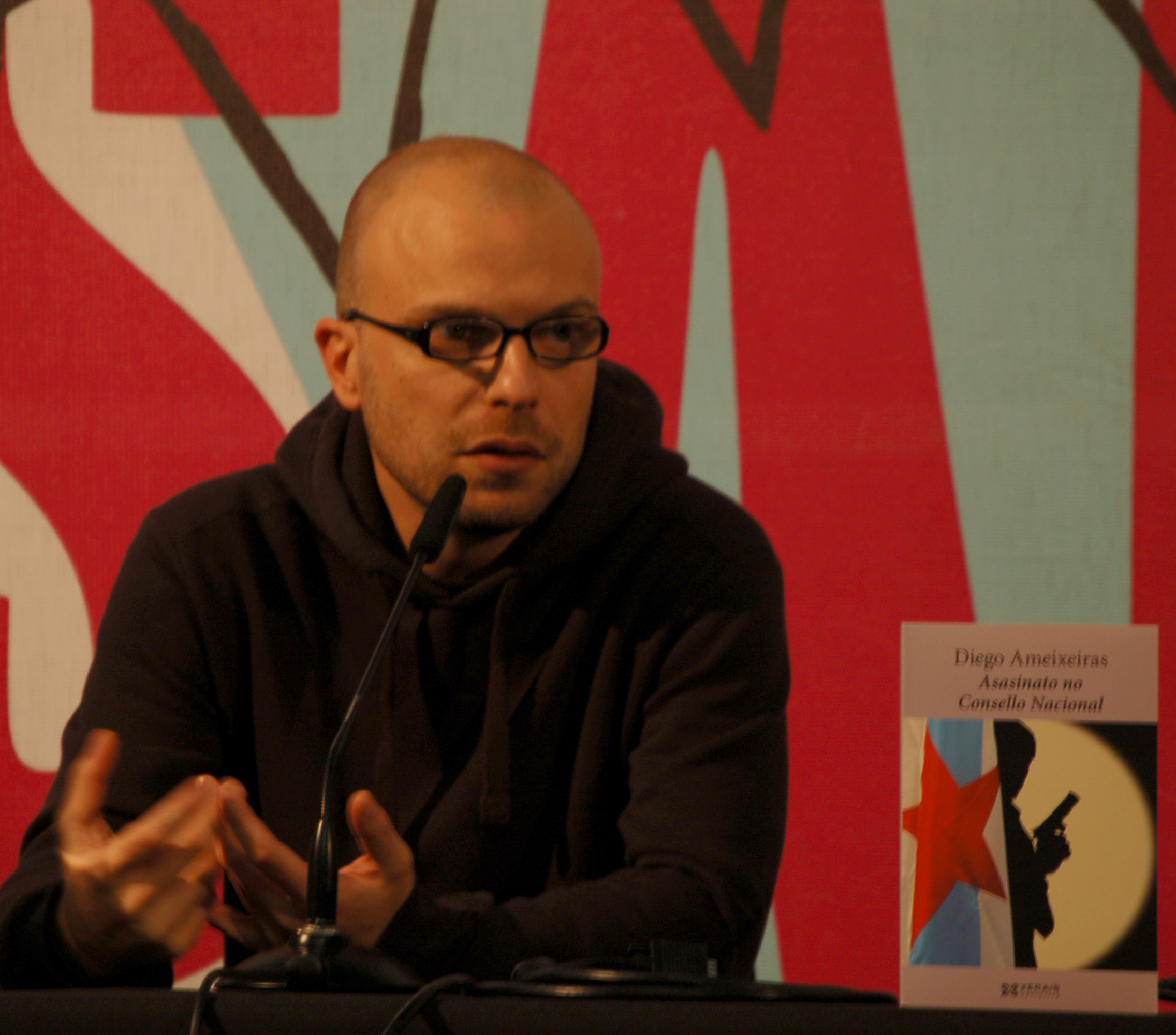 Diego Ameixeiras presentando a súa novela Asasinato no Consello Nacional no CulturGal 2010